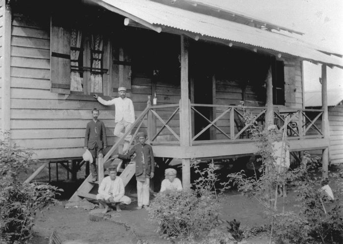 Foto. Als na ongeveer 1870 steeds meer cultuurmaatschappijen op talloze plaatsen op Sumatra hun geluk gaan beproeven, leven de mensen die een nieuwe onderneming moeten beginnen aanvankelijk in tamelijk primitieve omstandigheden. Van de luxe die later min of meer vanzelfsprekend is voor Westerse employees van dergelijke ondernemingen is dan nog geen sprake. Deze foto geeft aardig de fase van het 'Wilde Westen' van de Sumatraanse plantages weer. Aanvankelijk is het ook nog niet zo duidelijk waar de beste omstandigheden voor plantages te vinden zijn. De Residentie Lampong bleek om verschillende redenen geen geschikte regio. (P. Boomgaard, 2001). Groepje mannen bij de eerste opzichterswoning cultuuronderneming Kedongdong of Way Lima, Lampongse Districten, Zuid-Sumatra. Eerste opzichterswoning van een cultuuronderneming, Lampong, Zuid-Sumatra, 1897